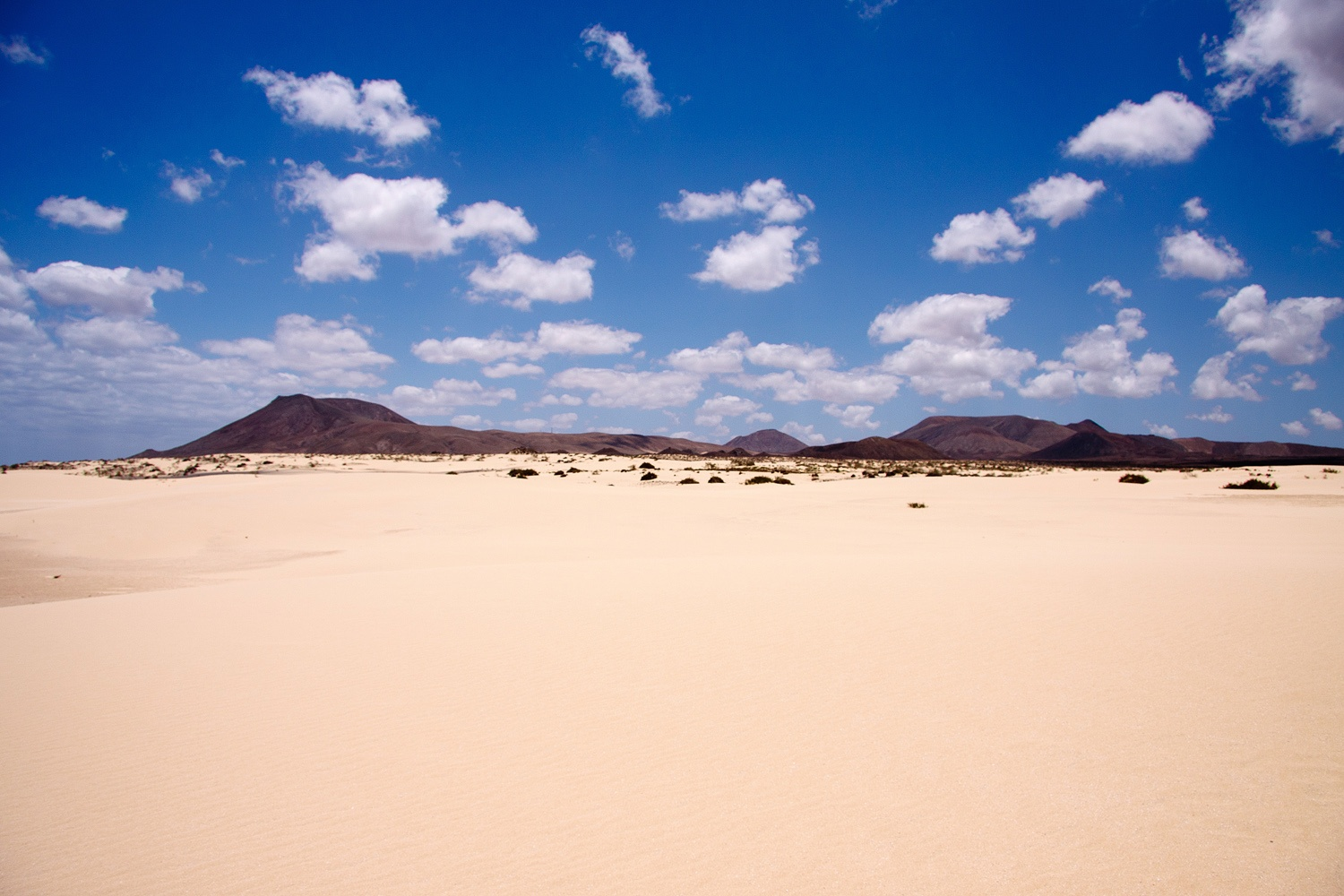 Playita del Poris, Fuerteventura, Kanarische Inseln, Spanien, Datum/Uhrzeit: 06.06.2011 14:05:04